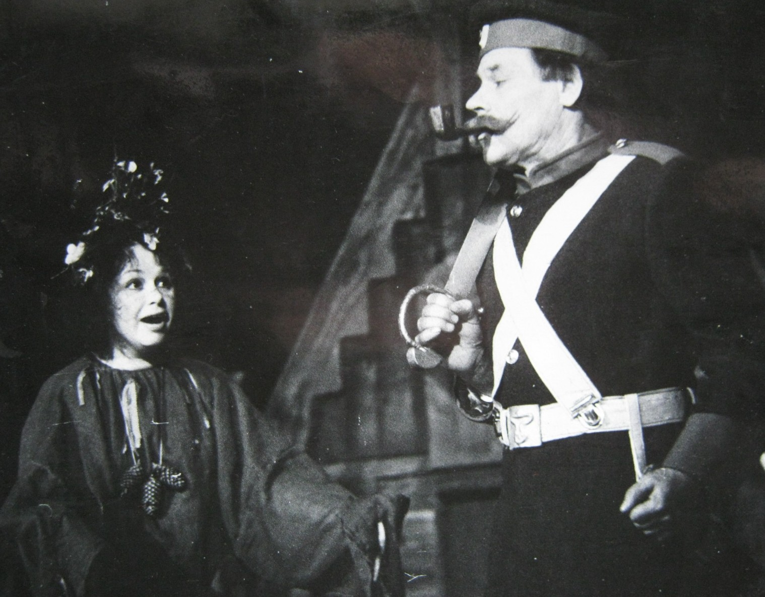 Спектакль Санкт-Петербургского драматического театра «Патриот» РОСТО «Сказ о солдате и Бессмертном Кощее» Татьяна Кудрявцева в роли Кикиморы, Юрий Оськин в роли Солдата, режиссёр-постановщик Егоров Г.С.